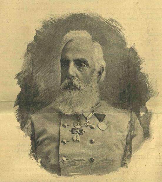 Habsburg–Lotaringiai Henrik főherceg